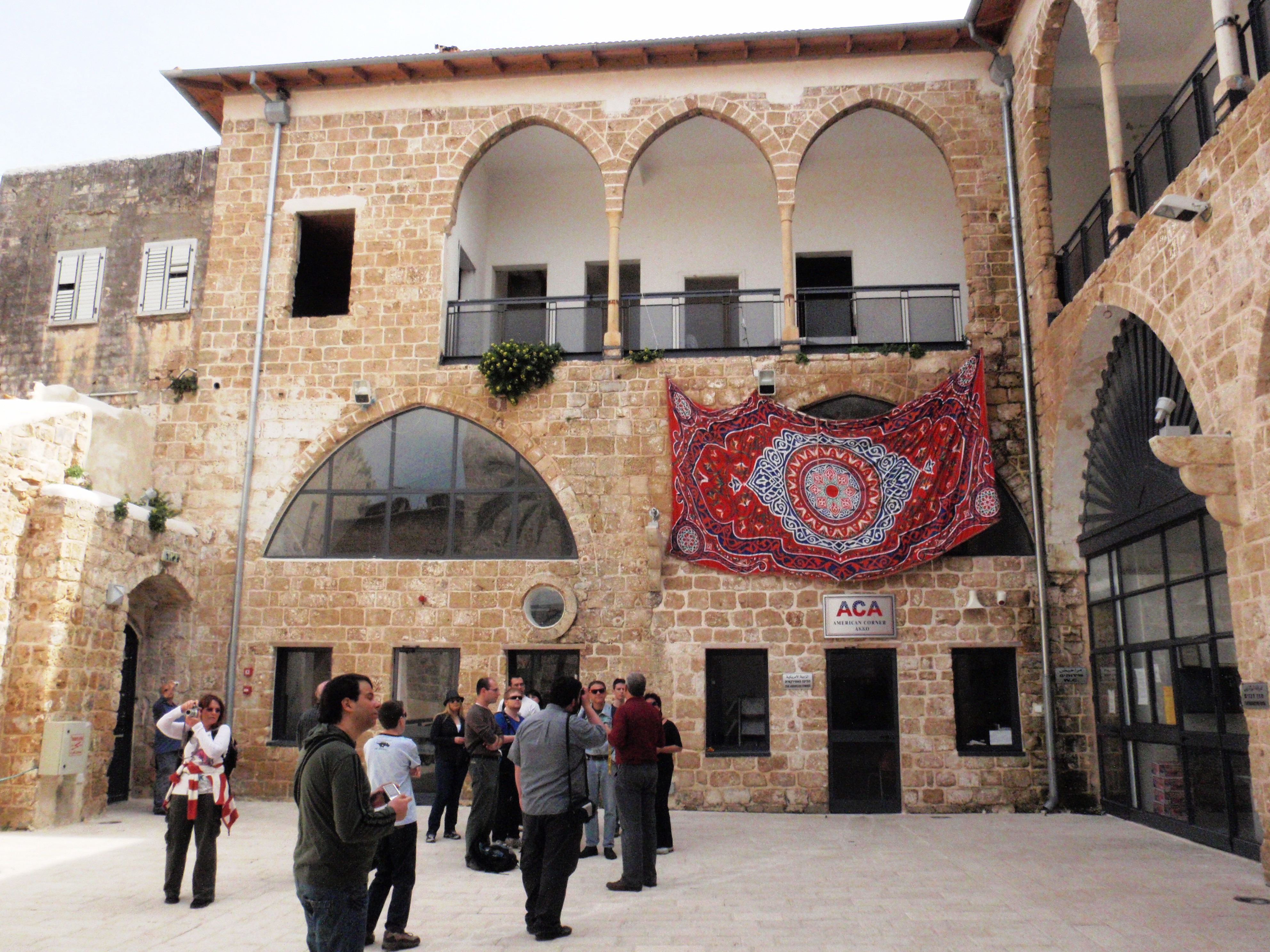 סיור בעכו The Sarraya